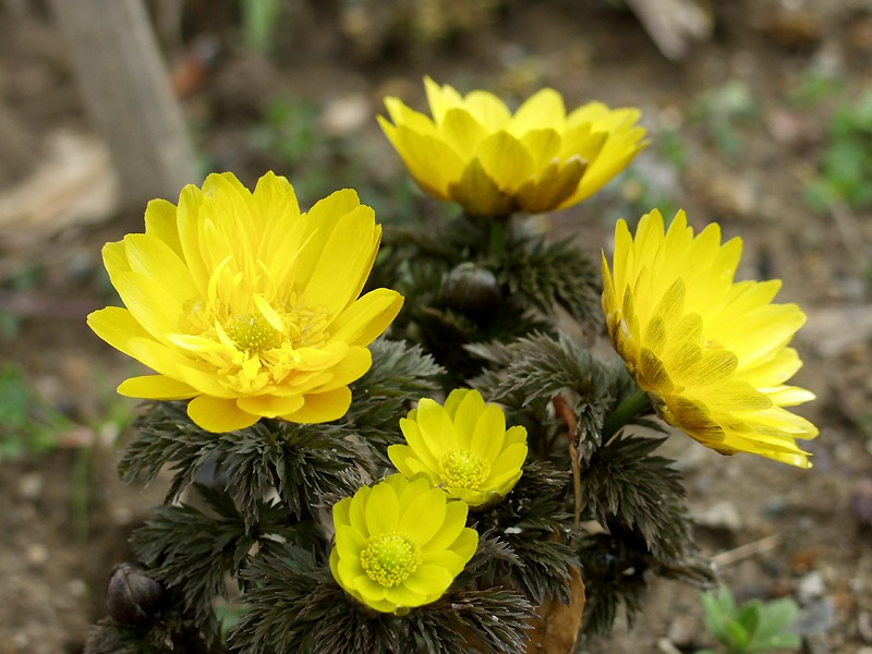 フクジュソウ（福壽草）